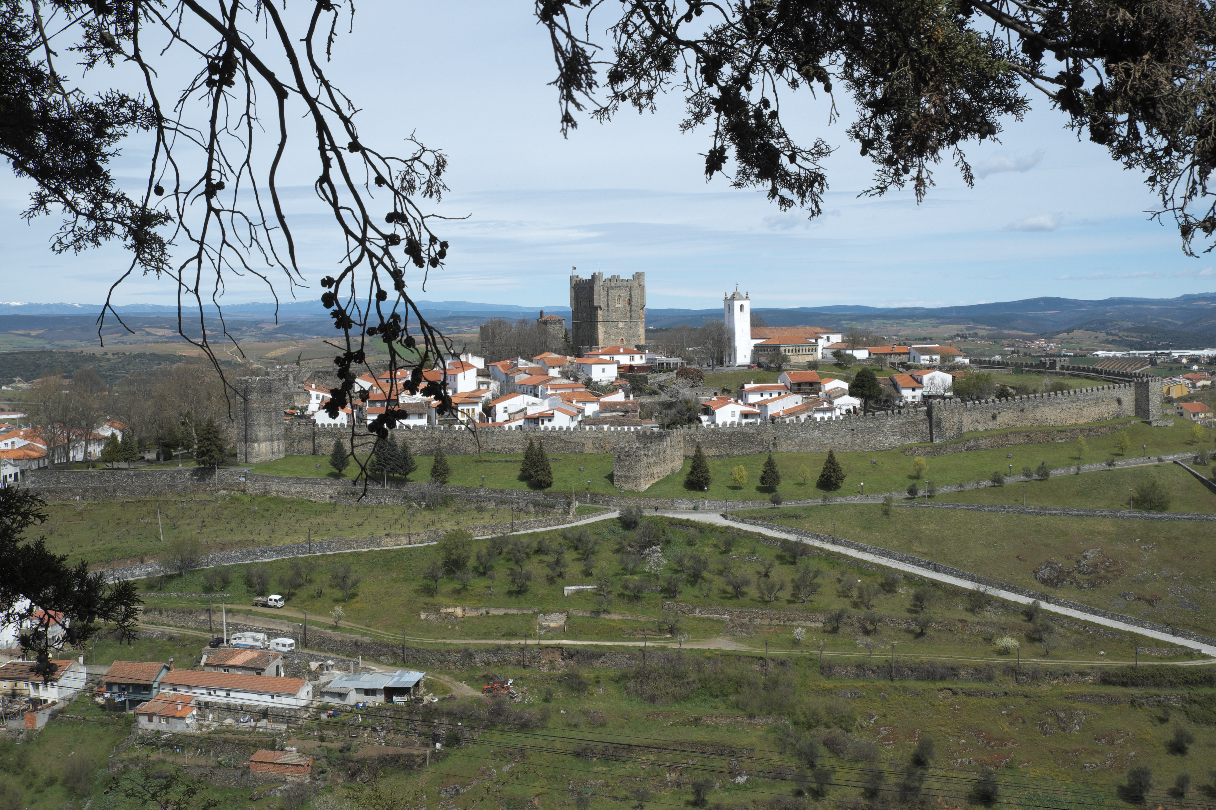 Burg Castelo de Bragança in Bragança in Nordportugal